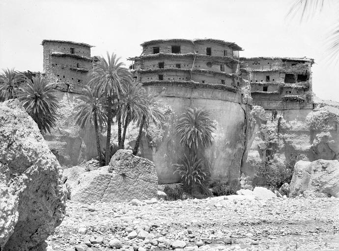 Guelaa à Baniane (Algérie) vers 1925, Georges-Louis Arlaud